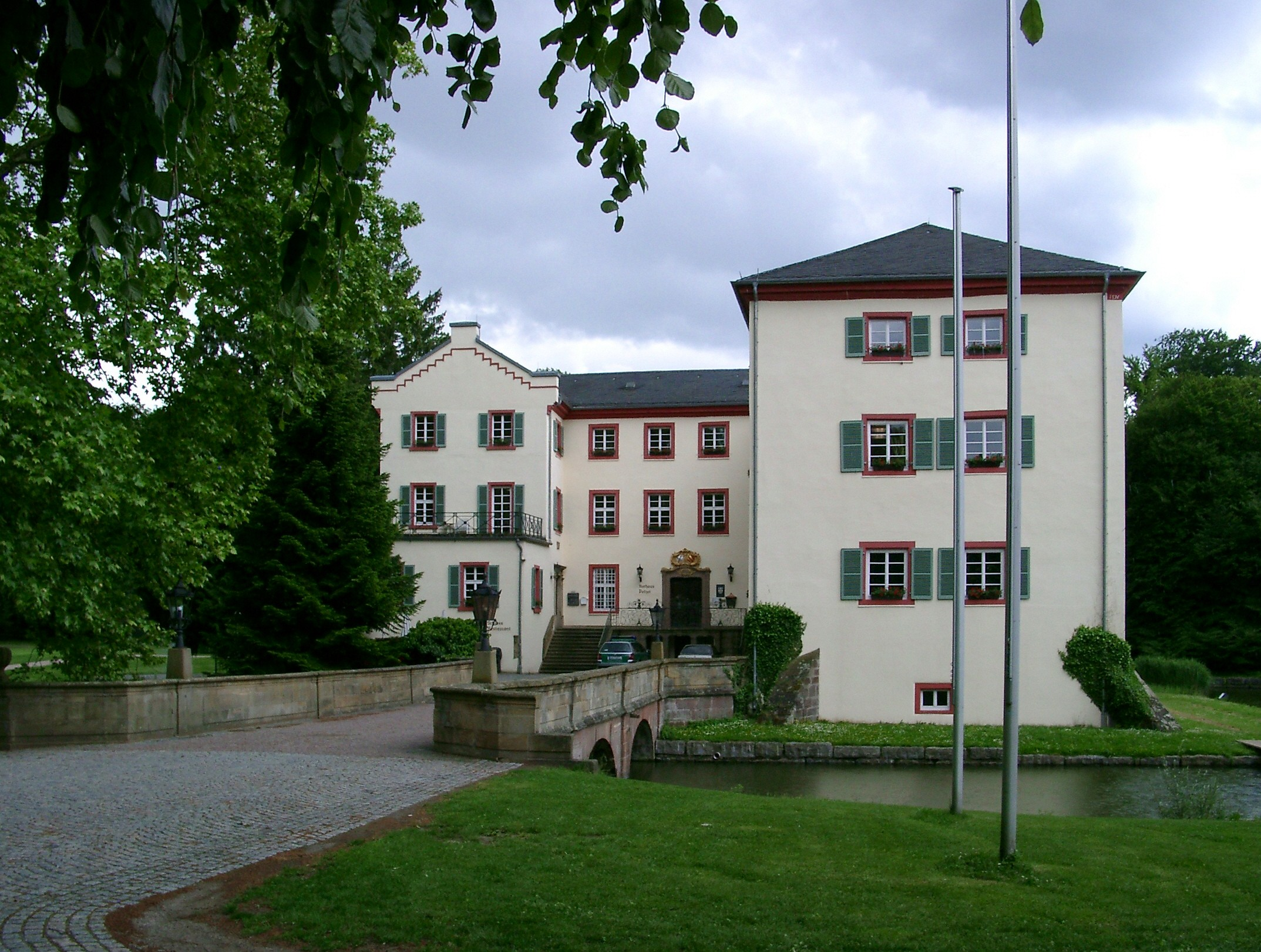 Angelbachtal, Ortsteil Eichtersheim, Schloß, u.a. genutzt als Rathaus